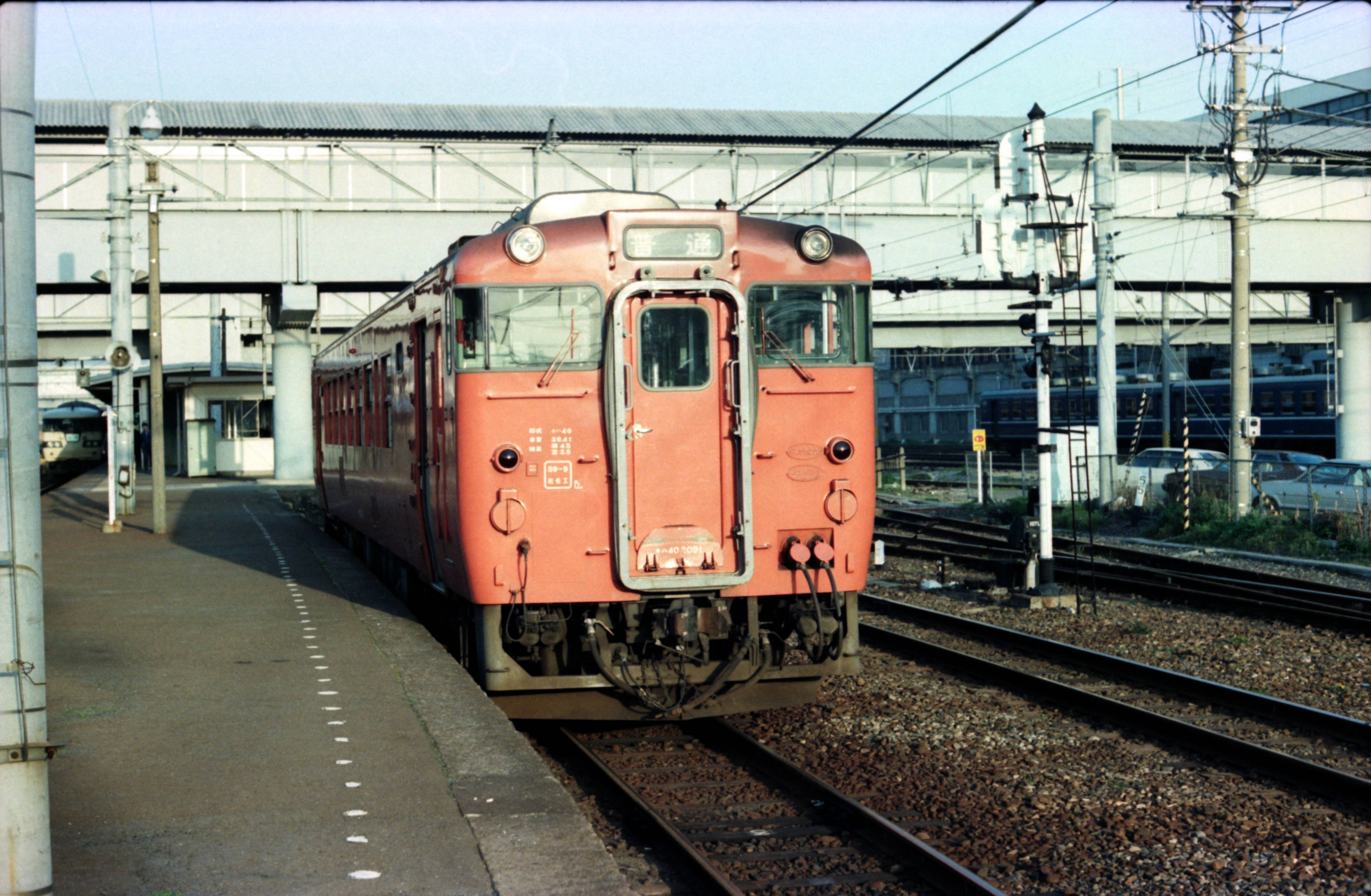 国鉄 飾磨港支線 姫路駅